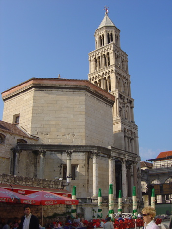 Crkva sv. Duje